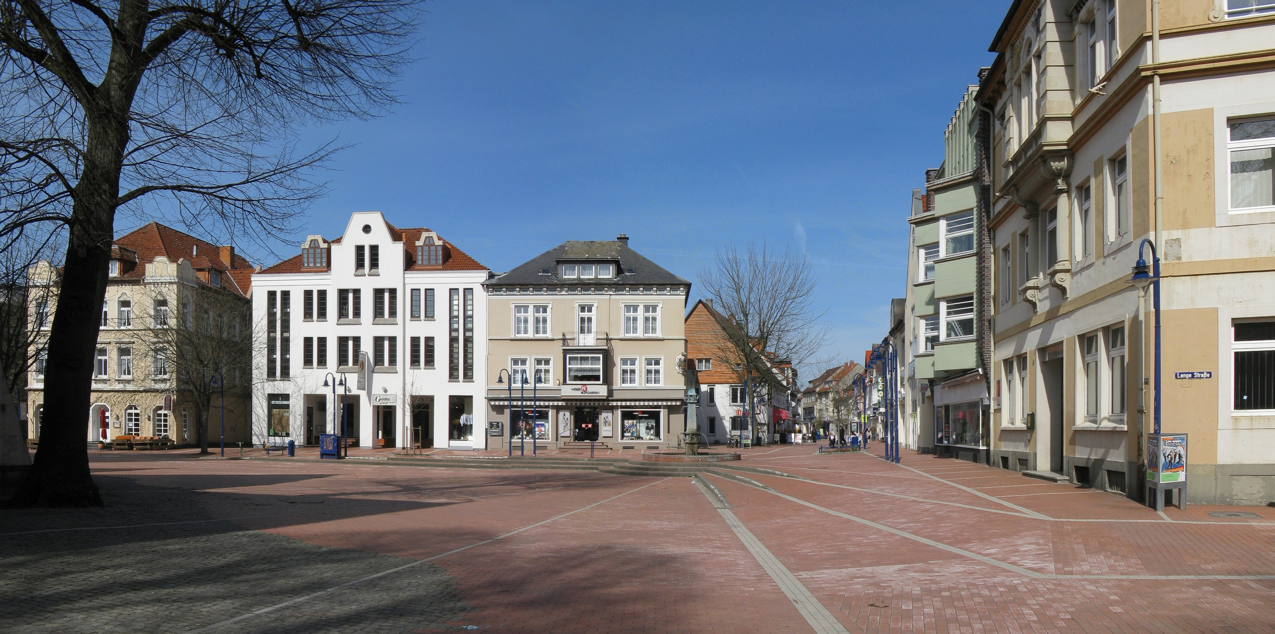 In der Innenstadt (Bergstraße) von Lage/Lippe